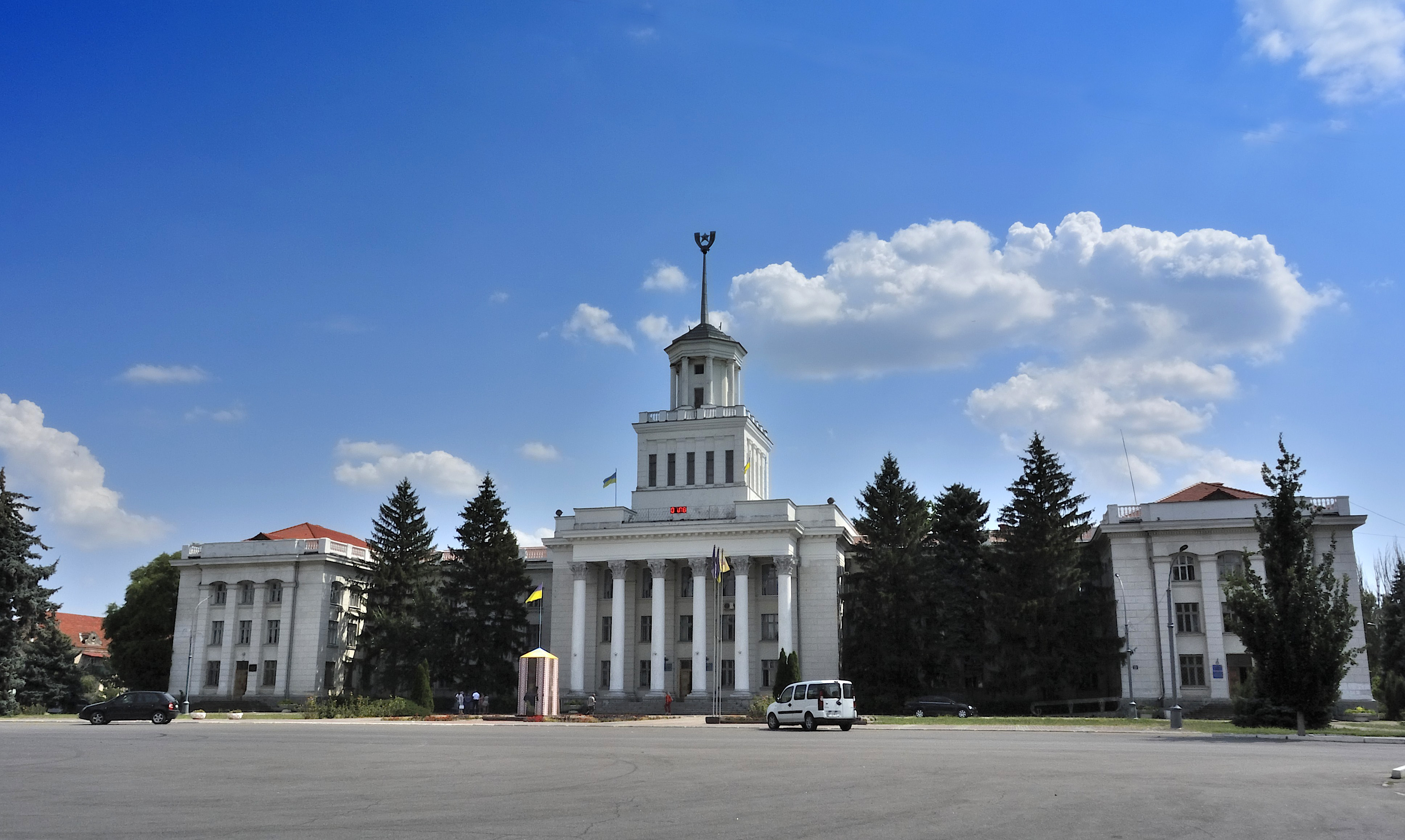 Ансамбль споруд Центральної площі у місті Нова Каховка, Нова Каховка, пр-т Дніпровський